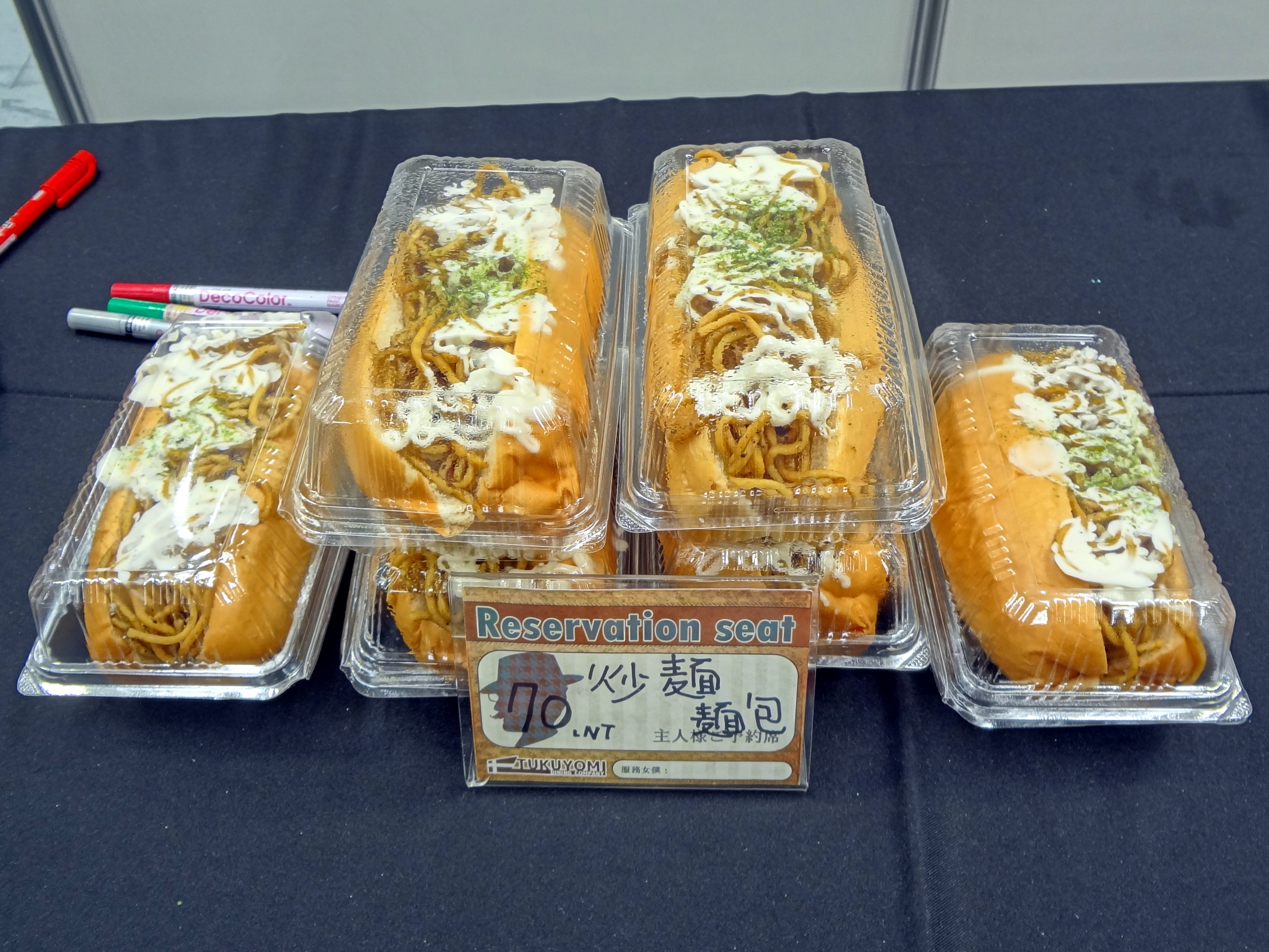 第28屆亞洲動漫創作展，月讀女僕咖啡攤位販售的炒麵麵包塑膠盒裝。